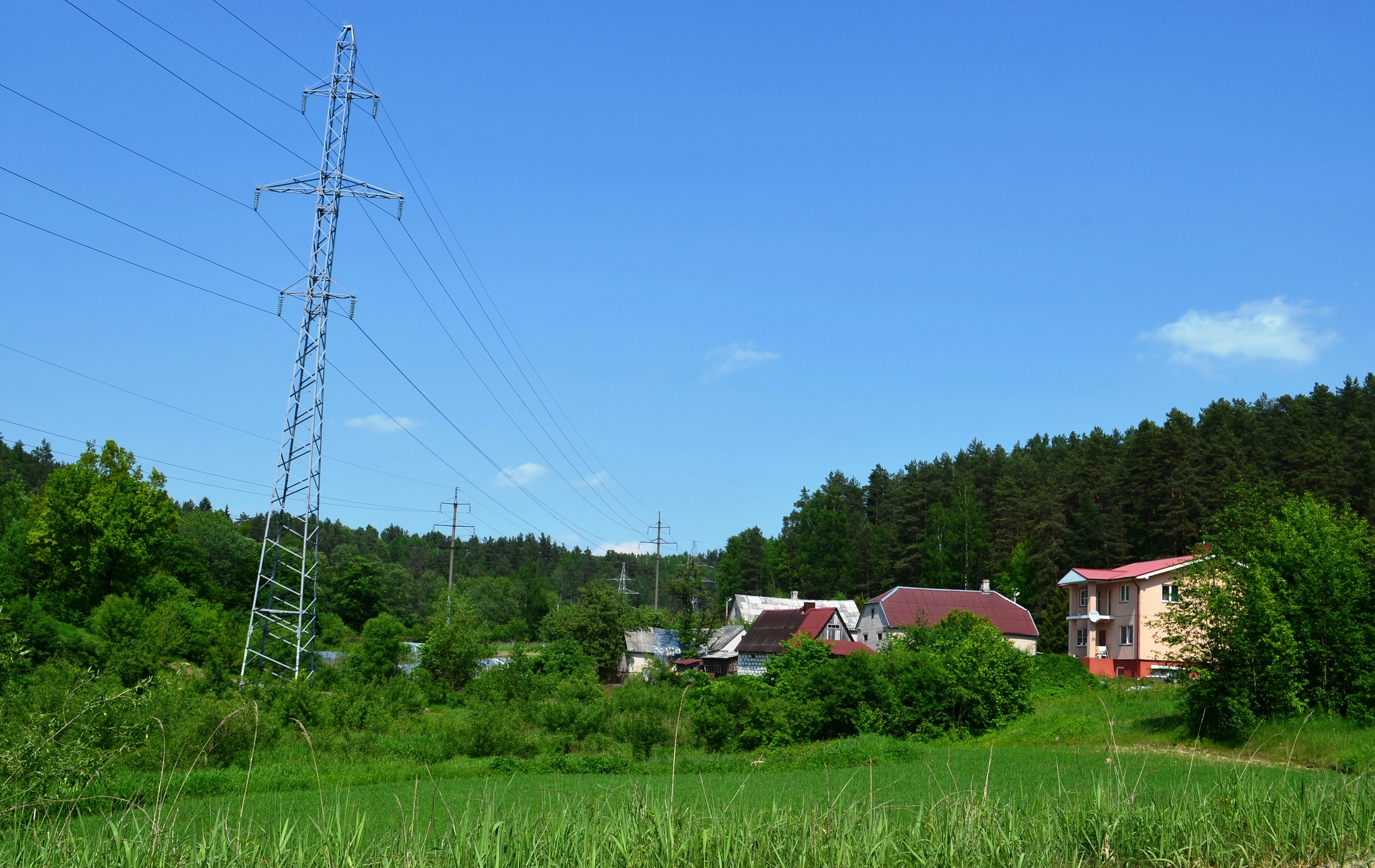 Senųjų Gudelių g., Gudelių kaimas, Vilniaus raj.